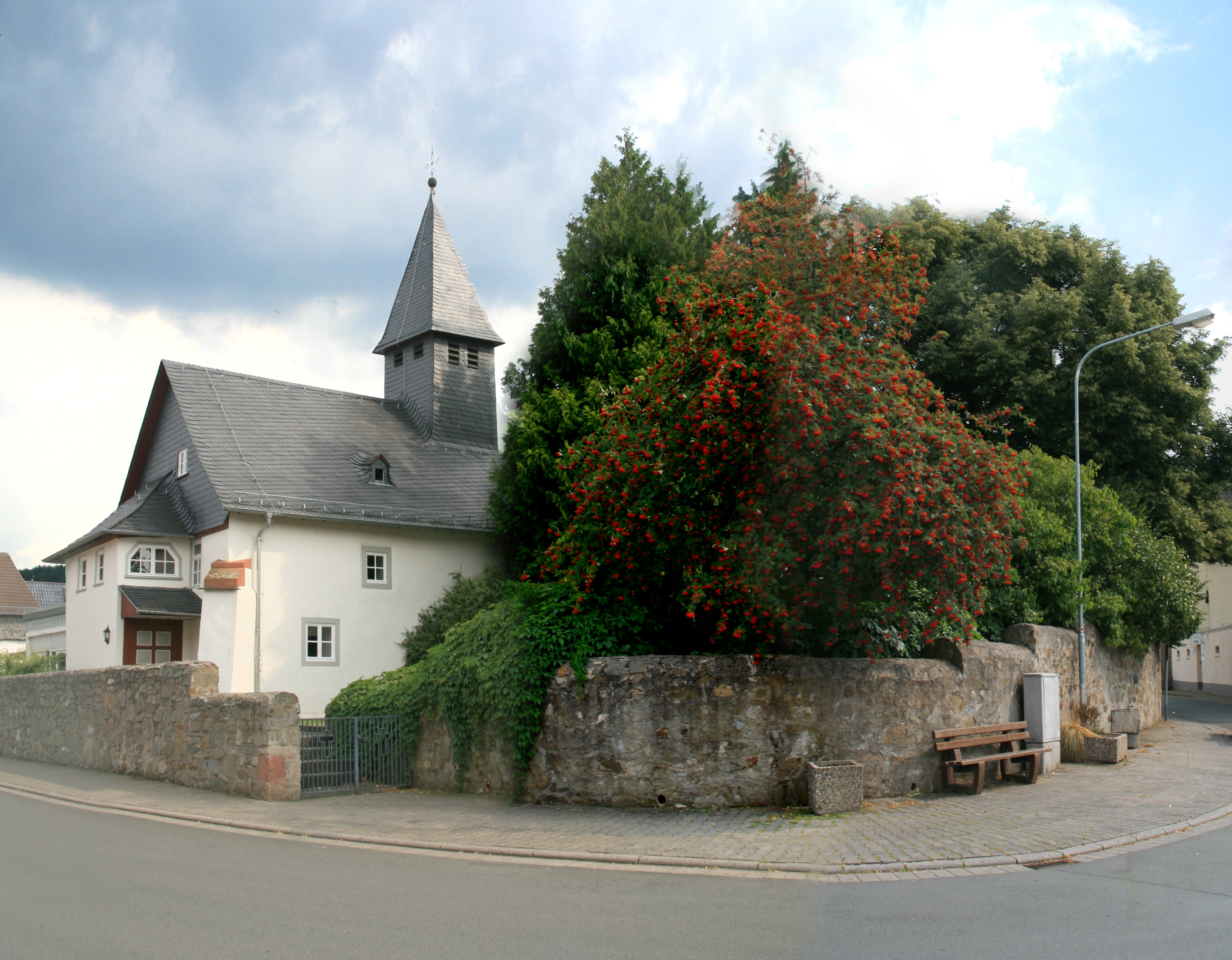 Kirche in Laufdorf, Gemeinde Schöffengrund